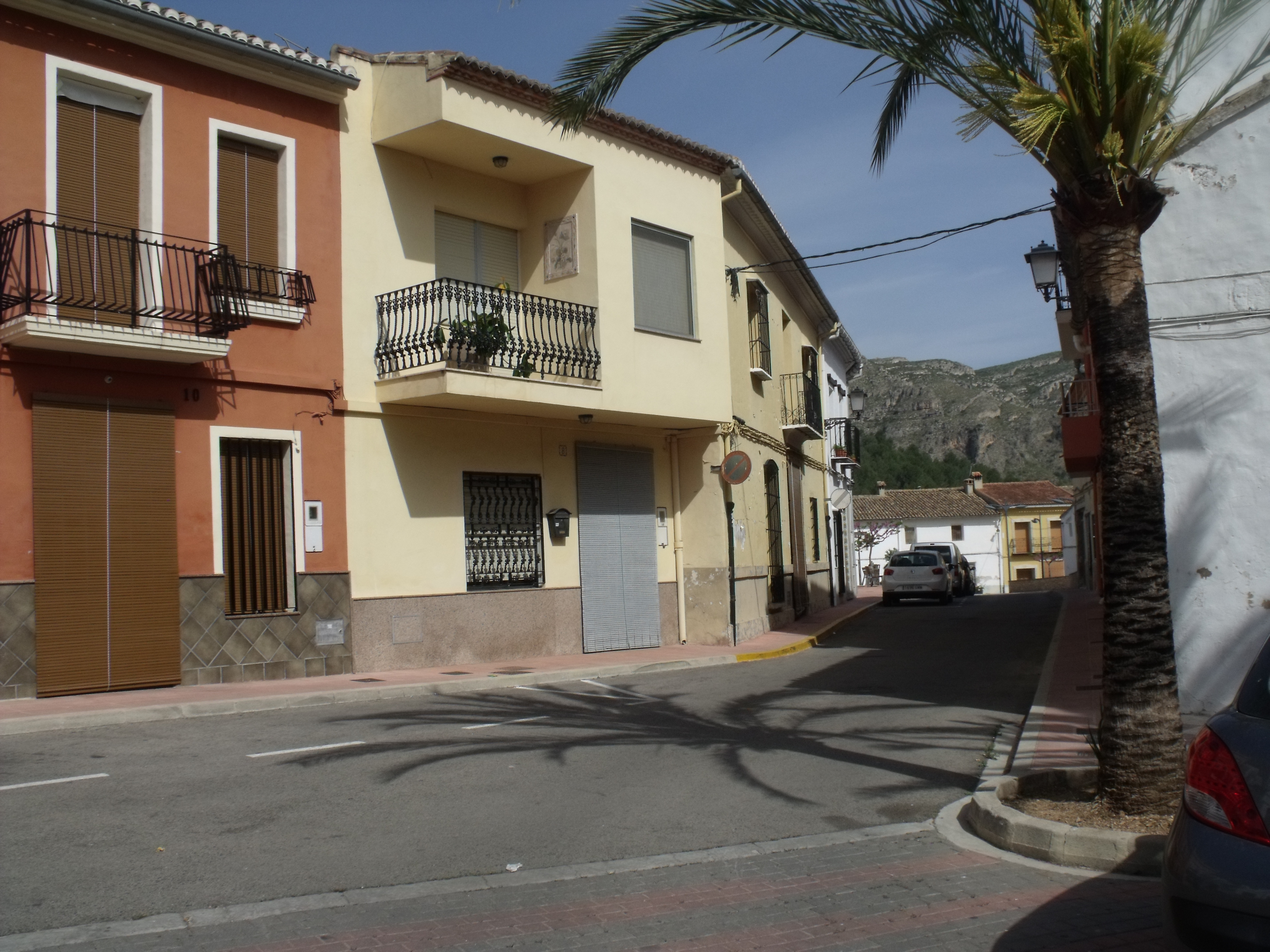 Almiserat, plaza del pueblo